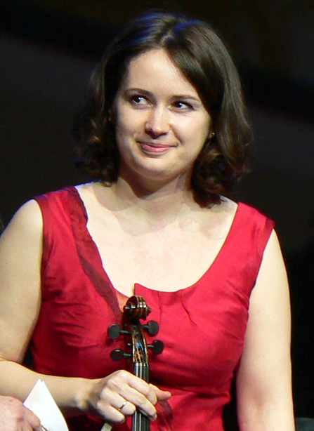 Patricia Kopatchinskaja bei der Verleihung Praetorius Musikpreis 2012